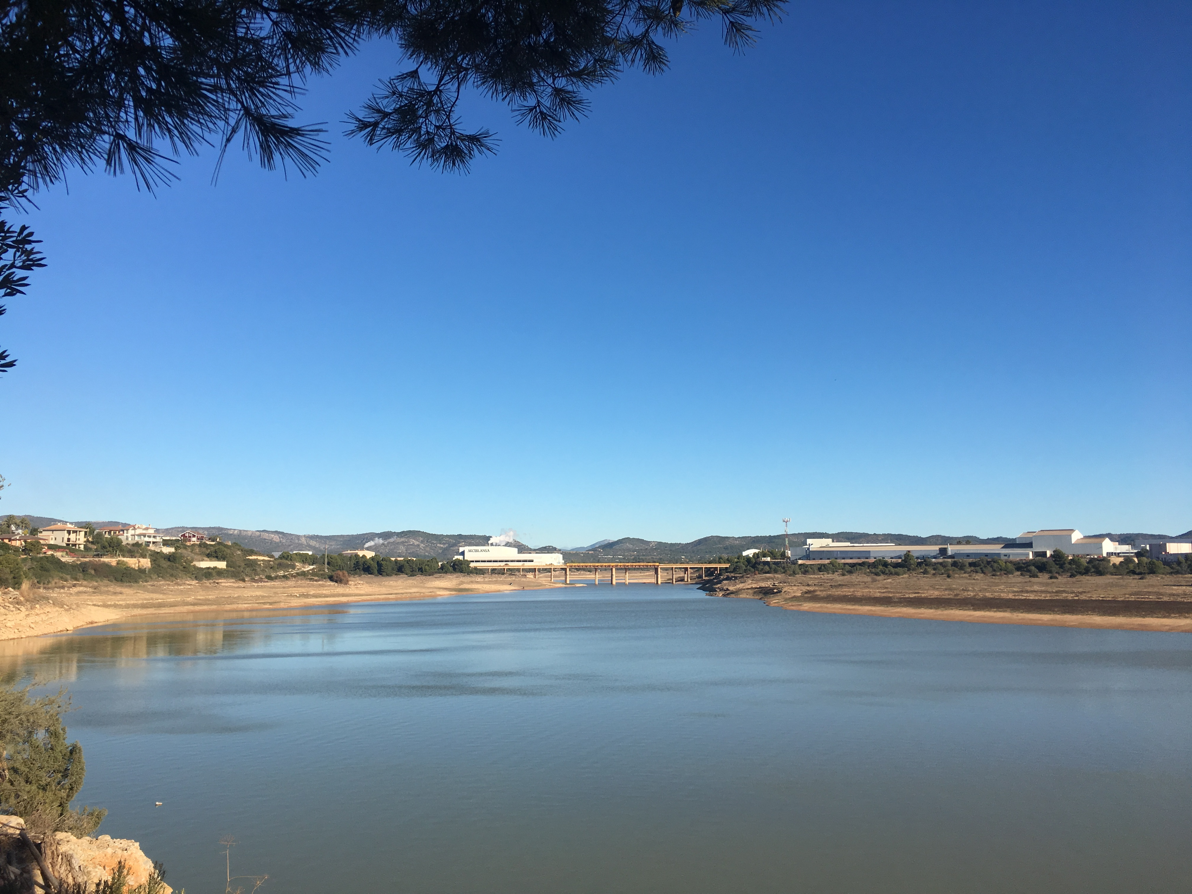 En aquesta imatge es pot observar el paisatge humanitzat de la zona del pantà.